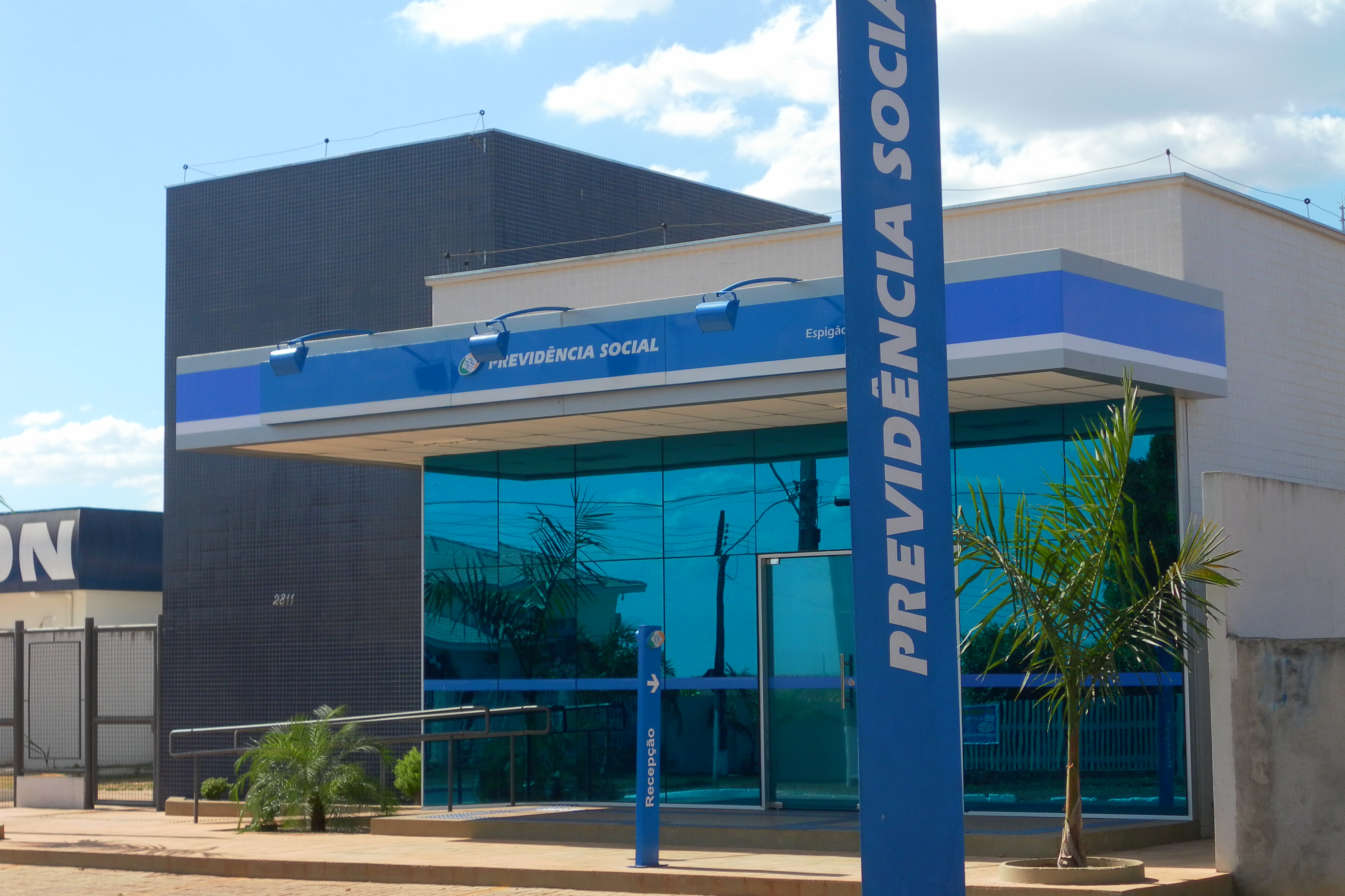 Previdencia Social de Espigão do Oeste - Rondônia.